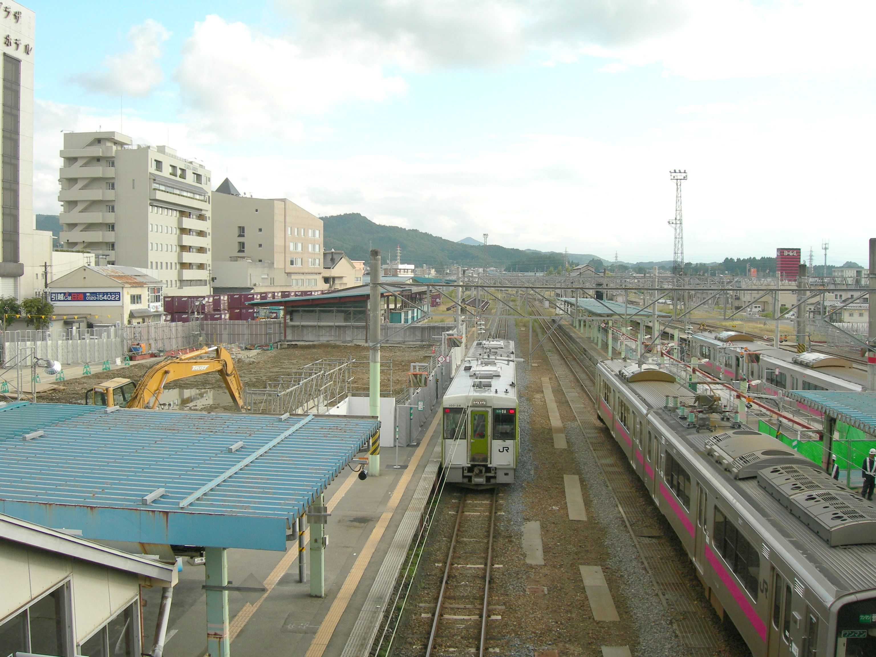 横手駅ホーム